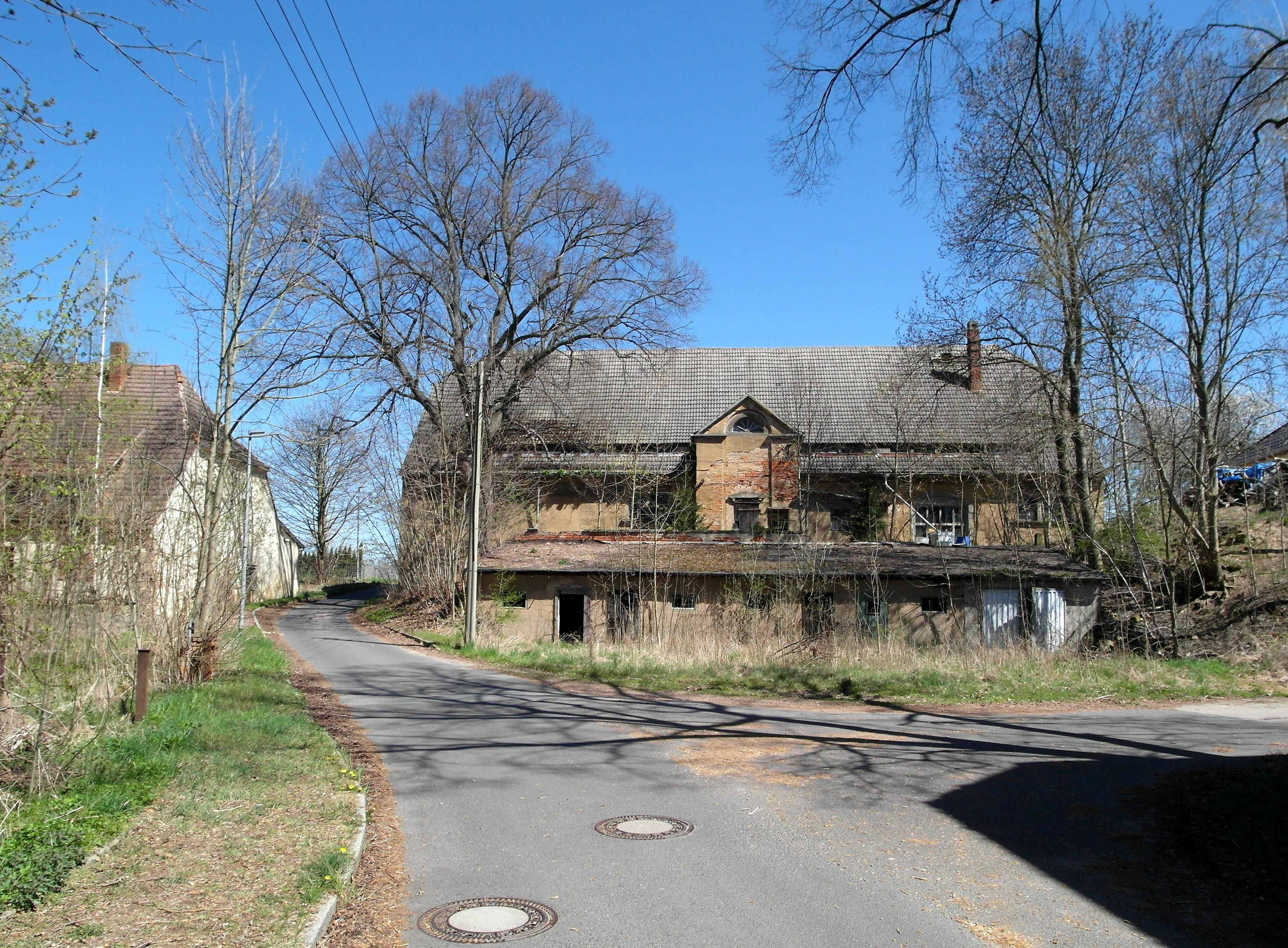 20.04.2015 01665 Löthain (zu Käbschütztal): Rittergut. Großes Nebengebäude Am Römerhaus 2 (GMP: 51.143654,13.410892) und links Kleines Nebengebäude (GMP: 51.143806,13.410503) [SAM9925.JPG]20150420545DR.JPG(c)Blobelt